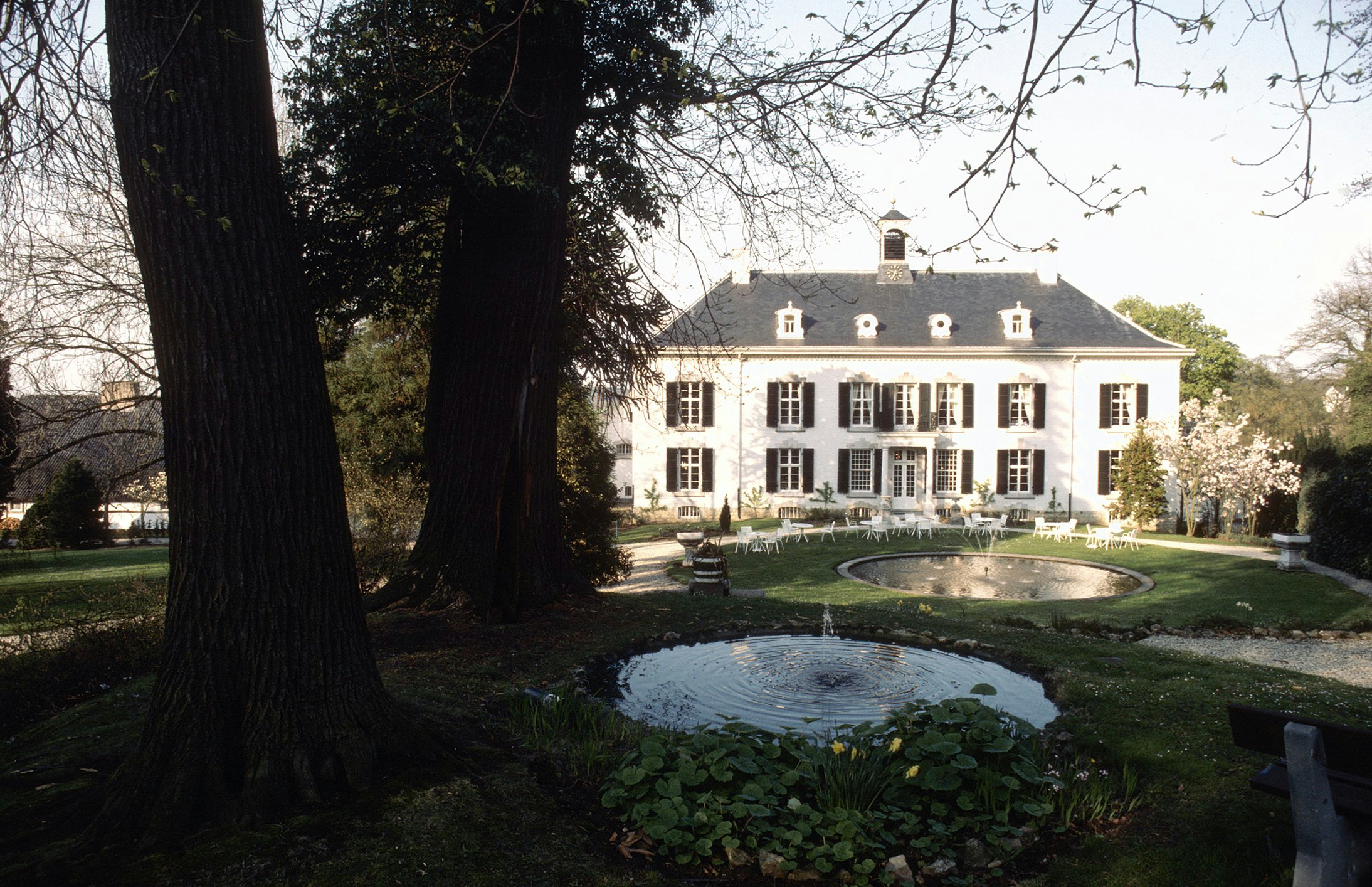 Kasteel Vaalsbroek: Exterieur OVERZICHT ACHTERZIJDE